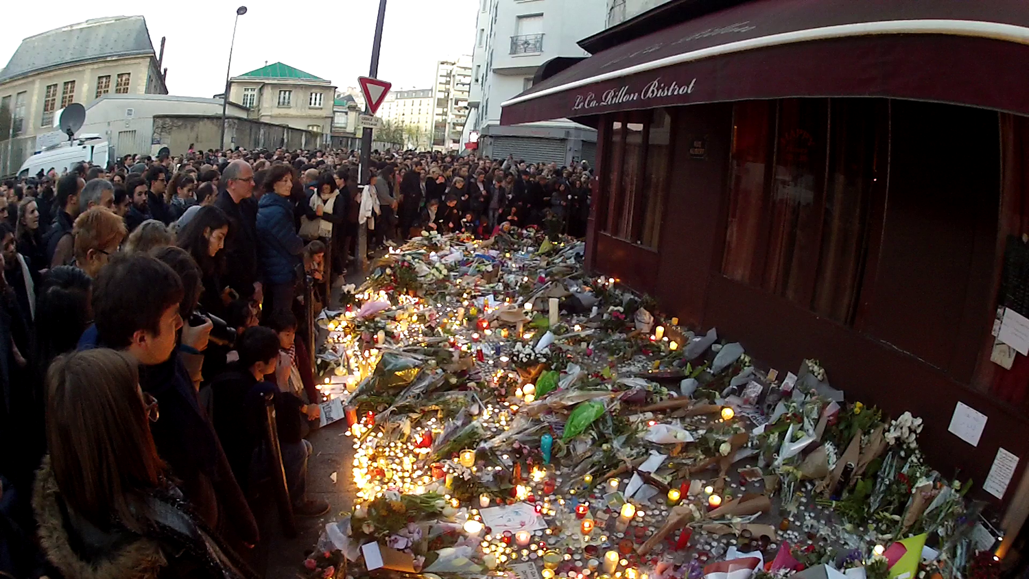 Rassemblement devant Le Carillon à Paris le dimanche suivant les attentats du 13 novembre 2015 en France.